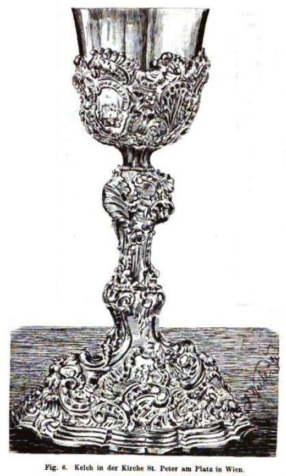 Gmünder Filigran. Aus: Kunstgewerbeblatt. Hrsg. von Karl Hoffacker. Leipzig: Seemann. S. 133–136